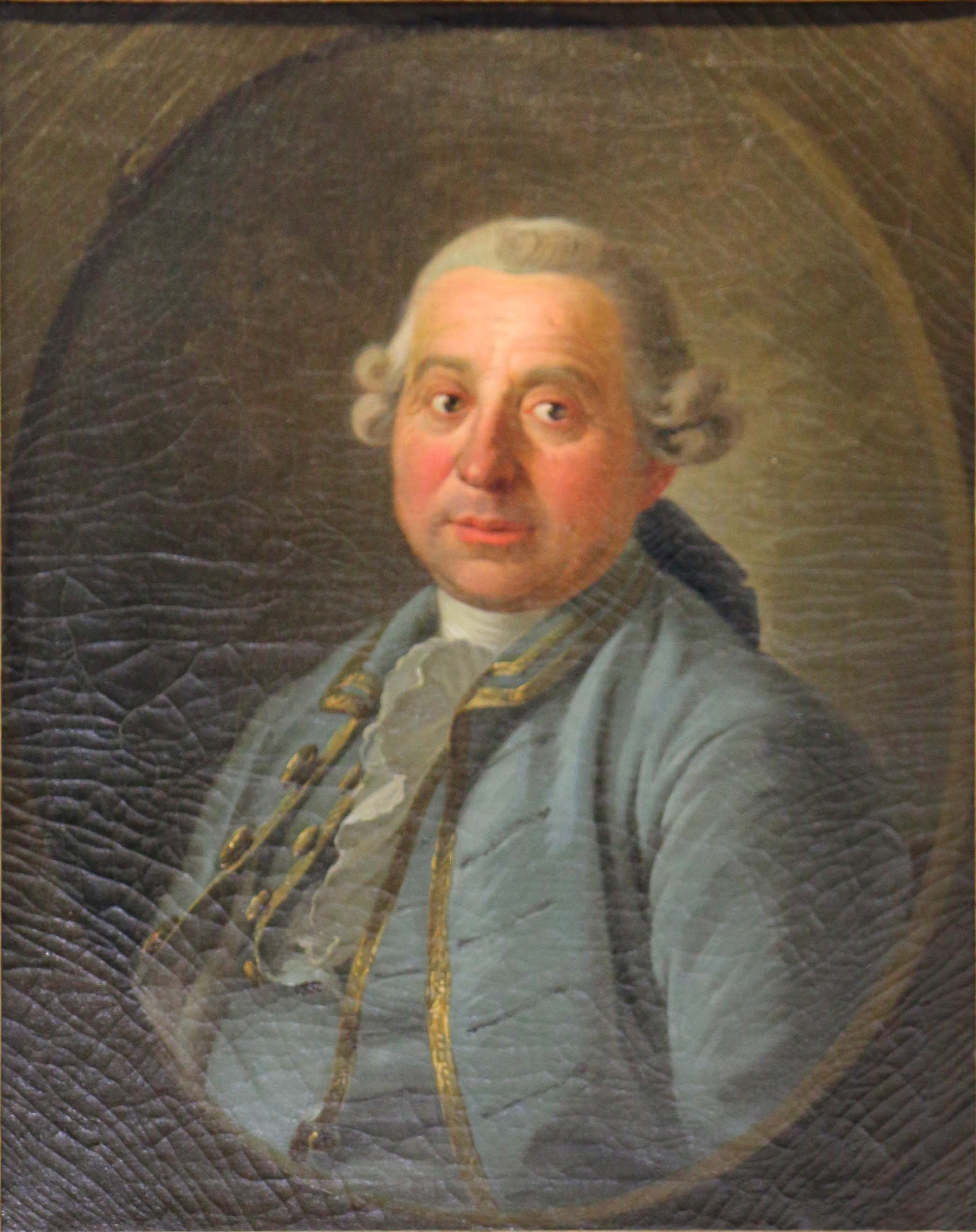 Portrait de l'architecte Esprit-Joseph Brun réalisé par le peintre Louis Chaix. Ce tableau se trouve dans le grand salon du château Borély à Marseille décoré par Louis Chaix.